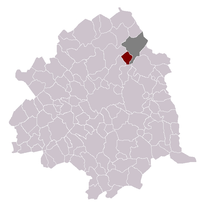 Mouvaux dans son canton et son arrondissement